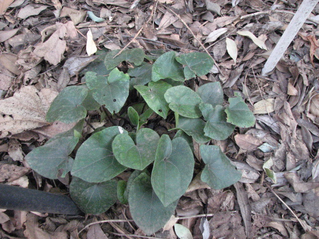 Heterotropa nipponica Kan-Aoi(カンアオイ)